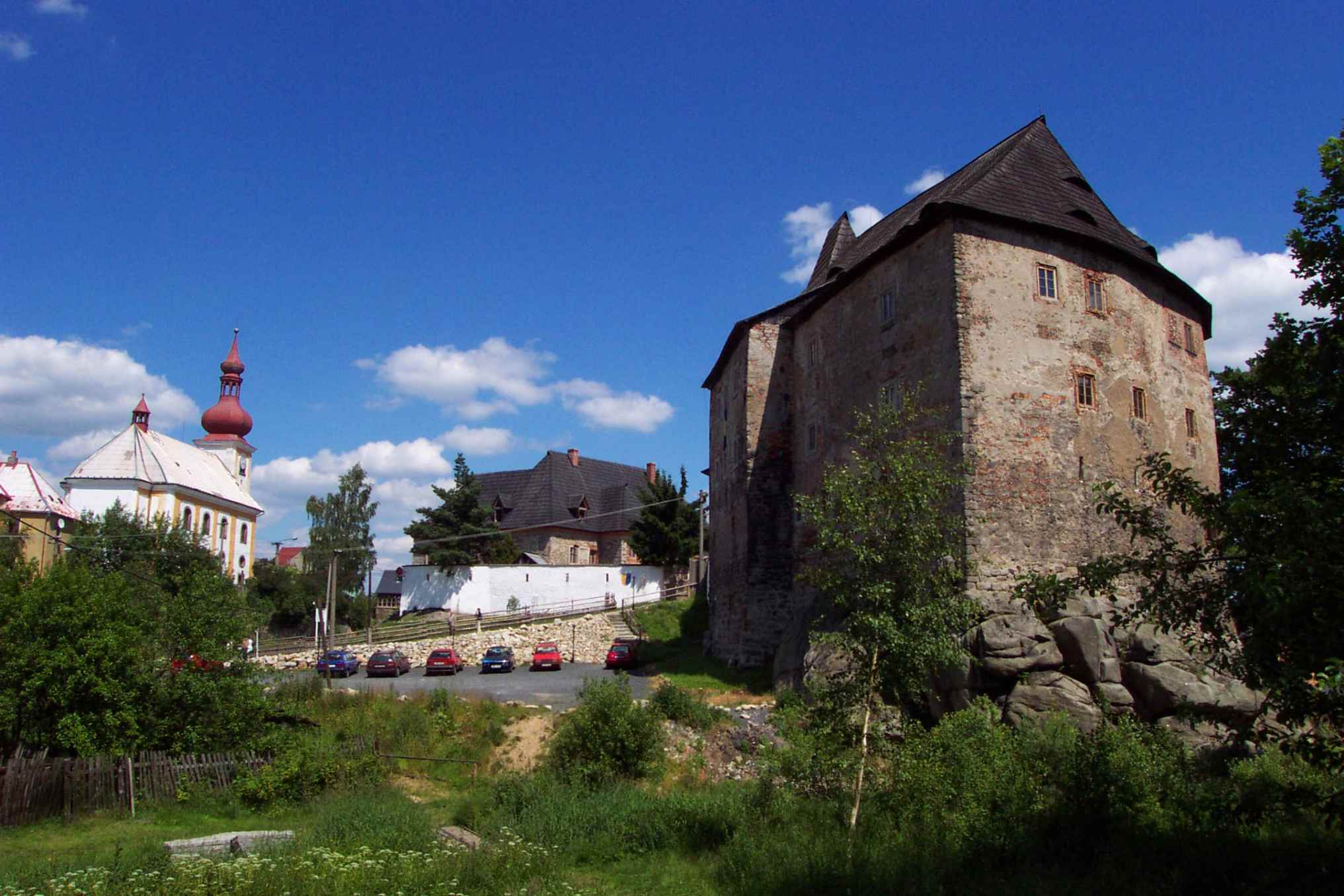 Burg Wildstein (Skalná) bei Cheb (Eger)